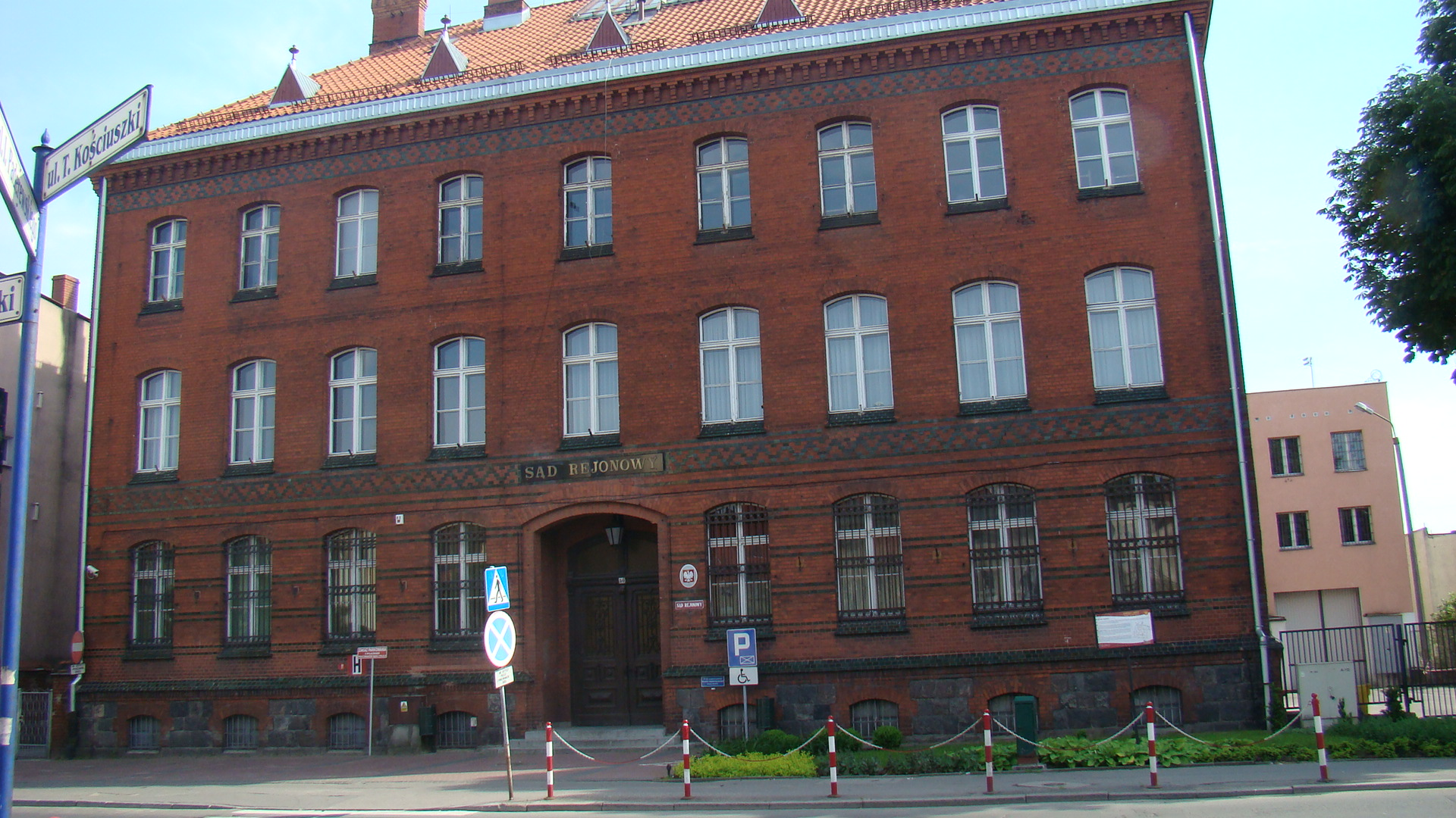 Budynek Sądu Rejonowego znajdujący się przy ul. Tadeusza Kościuszki 30.